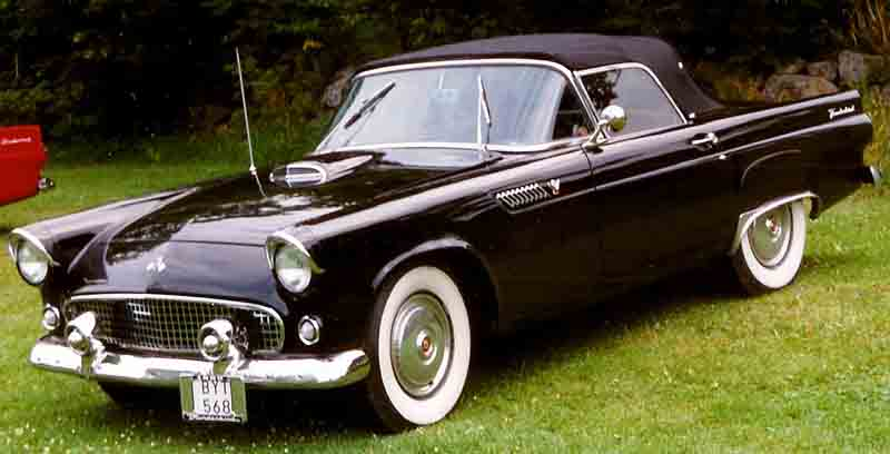 Ford Thunderird 1955